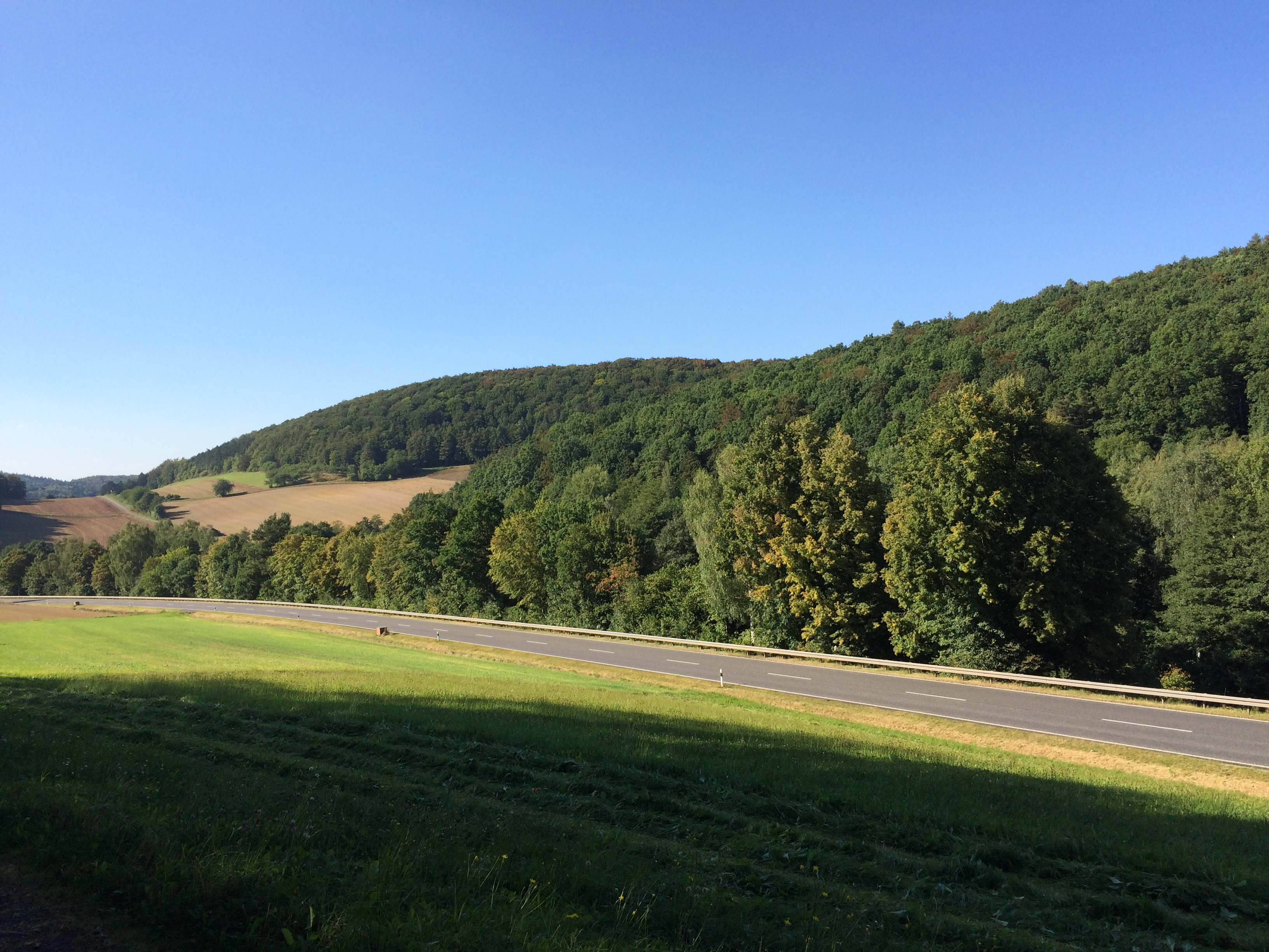 Blick vom Werra-Burgen-Steig Hessen (X5H) auf die Bundesstraße 400 zwischen Ulfen und Unhausen, Gemarkung Sontra